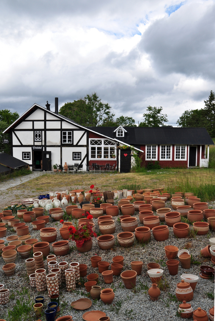 Gotland kn, Etelhem Tänglings 1:73 ETELHEMS KRUKMAKERI